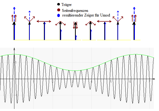 Resultierende Amplitude des modulierten Signals mit Hilfe der Zeigerdarstellung